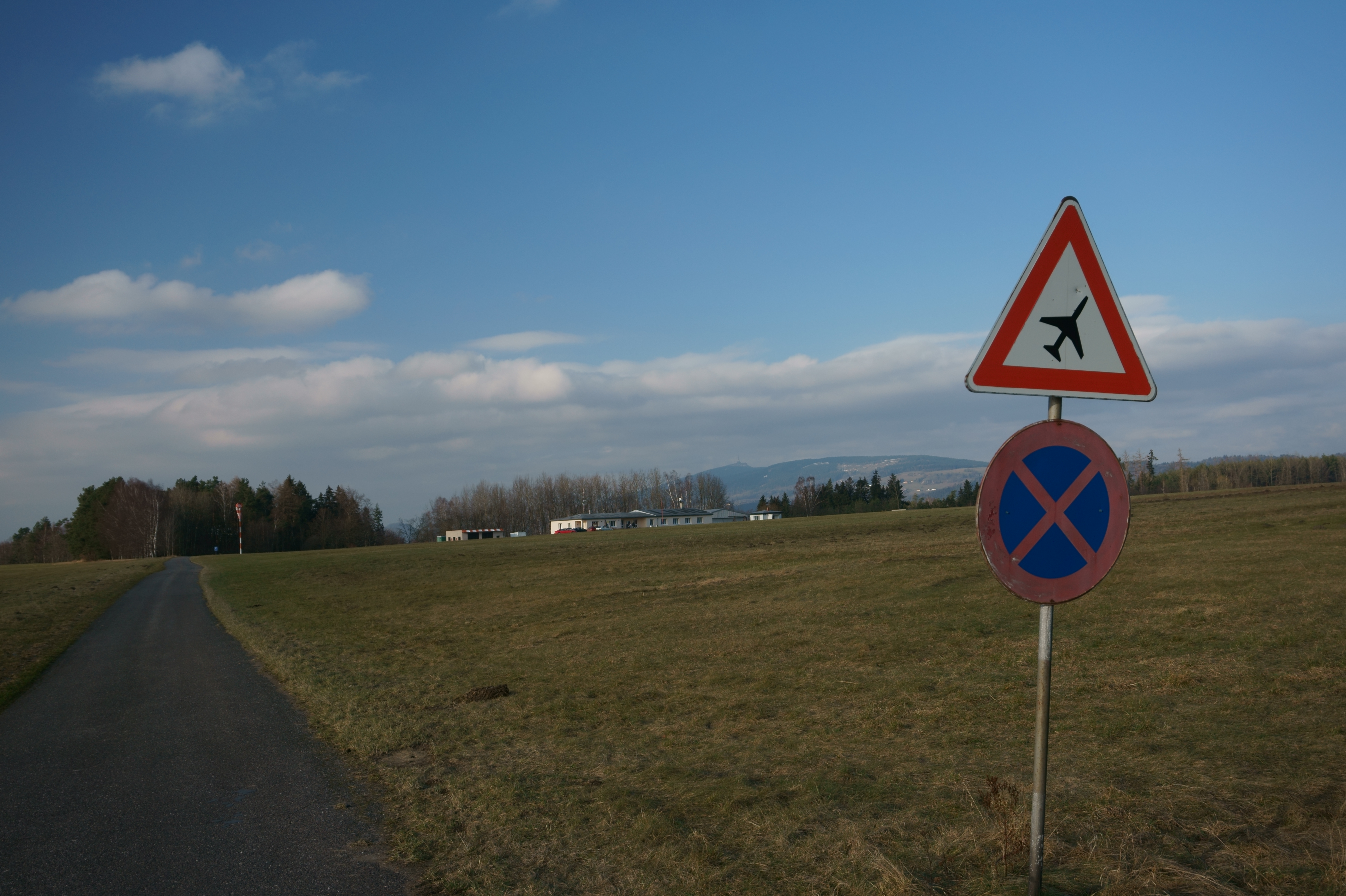 Hodkovice nad Mohelkou - letiště, značení příjezdu